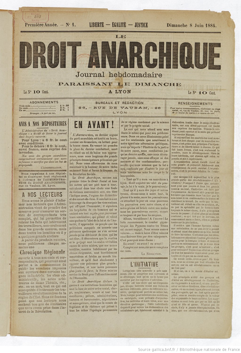 Le Droit Anarchique : 3 numéros publiés en juin 1884.